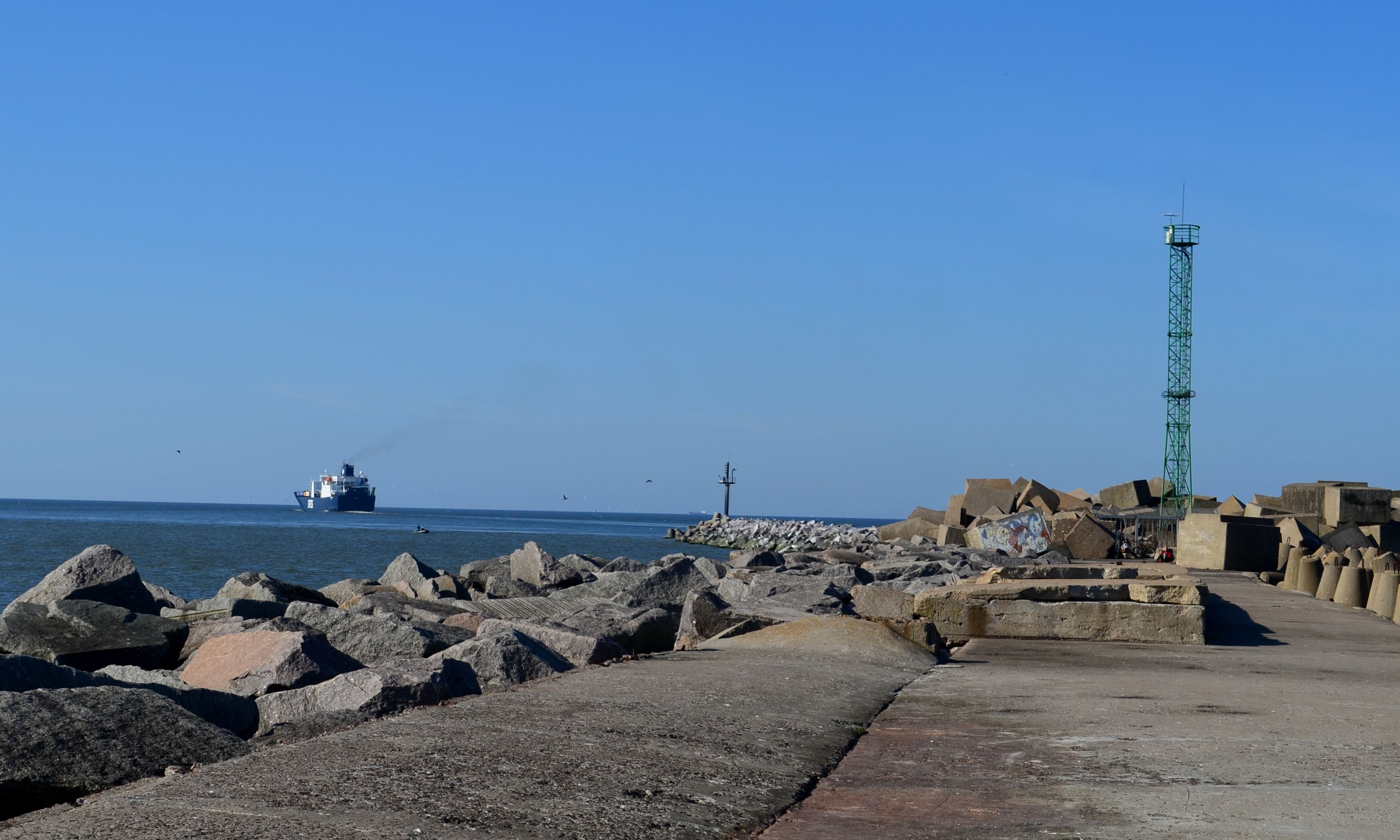 Pietinis molas, Kopgalis, Klaipėda